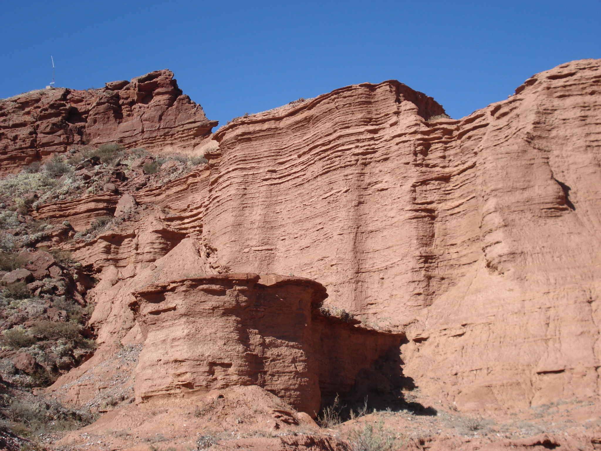 Foto de un sector de las sierras de las Quijadas en la provincia de San Luis, Argentina.